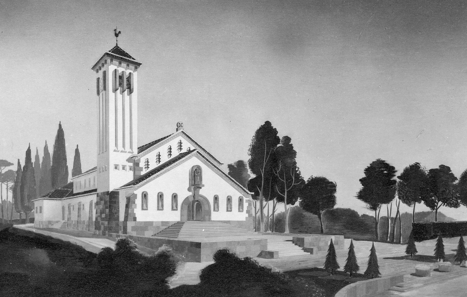 Igreja Paroquial de Riachos